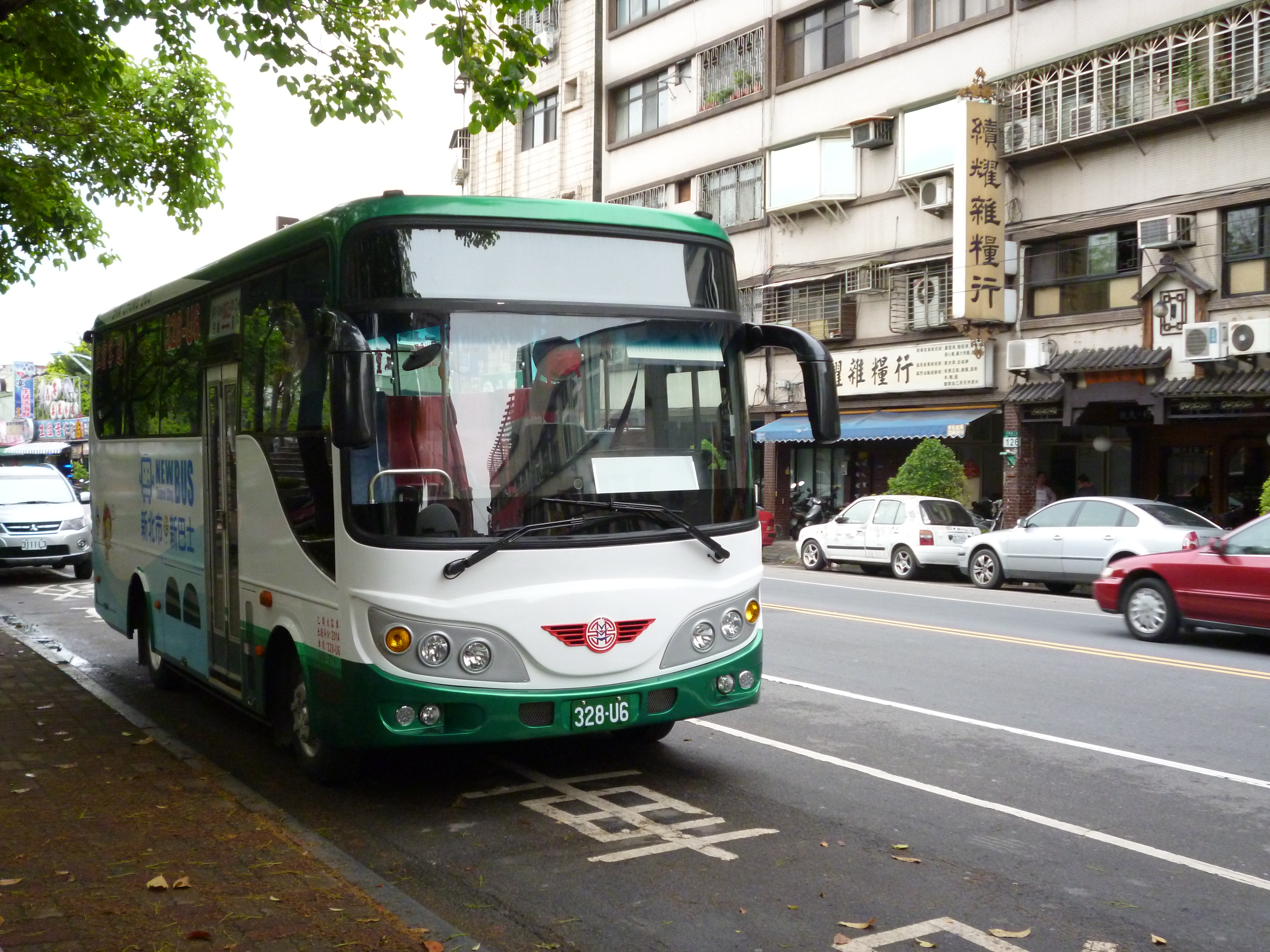 三重客運2015年五十鈴NQR90KMB5大客車328-U6，右側貼新北市新巴士彩繪。